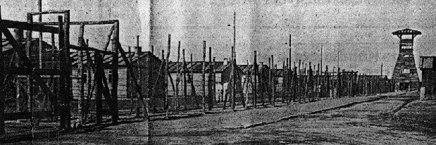 Lager Rollwald Quelle: Fundstück Zeichner: unbekannter Gefangener Datum: um 1940